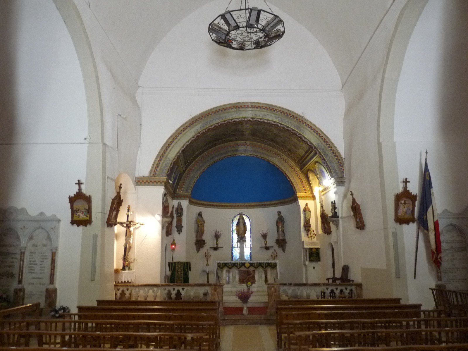 Autel principal, église de Formiguères, Pyrénées-Orientales, France